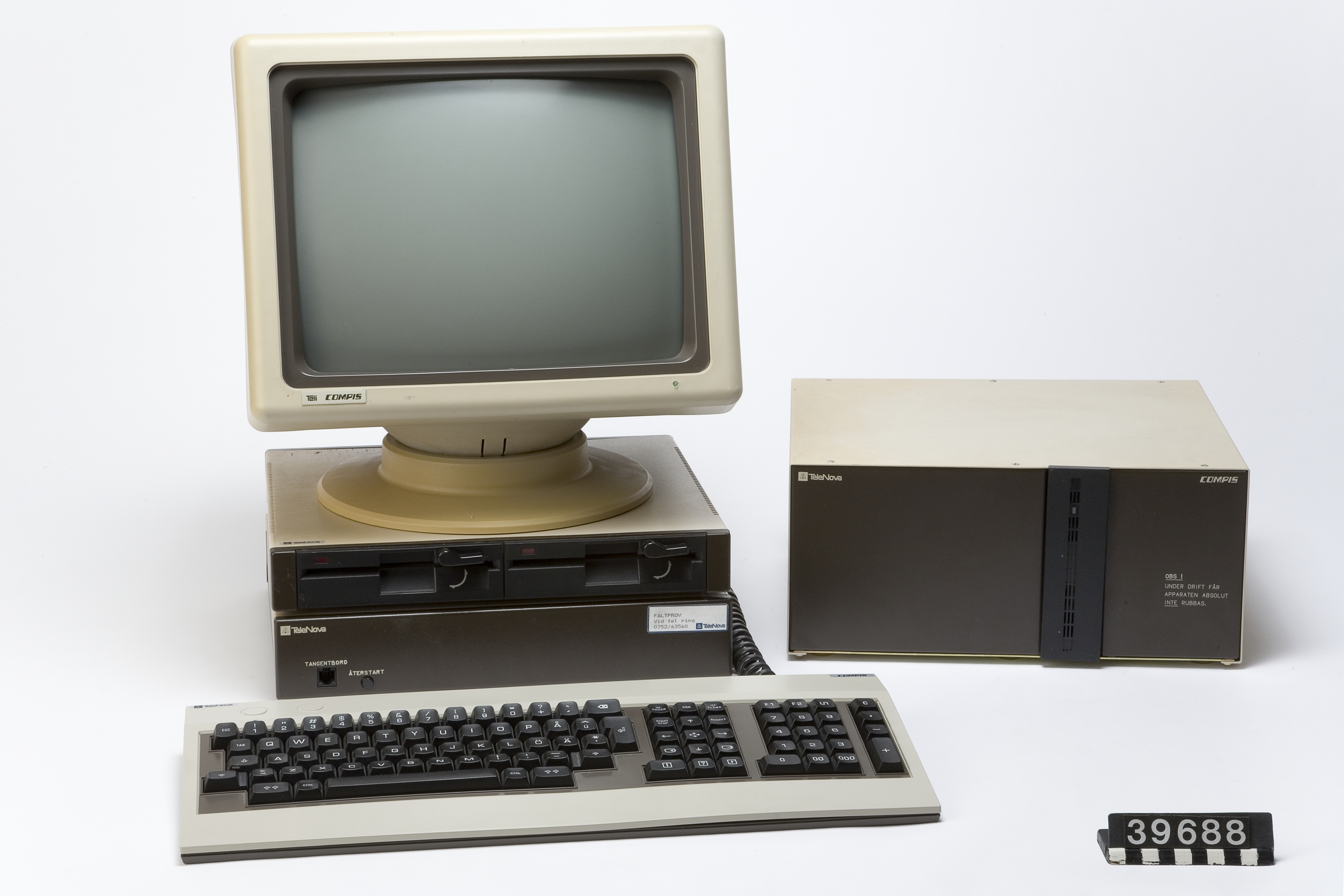 Centralenhet av beige plåt, frontpanel i svart plåt. Anslutningskontakt till tangentbord (RJ-45) och knapp på frontpanelen. Märkt TeleNova samt etikett "FÄLTPROV". Anslutningskontakter på baksidan. Enheten är något högre än vad centralenheter till Compis normalt brukar vara. Diskettenhet av beige plåt, frontpanel i svart plast. Två 5,25-tums diskettenheter. Fast monterad anslutningskabel samt kontakt för strömmatning på baksidan. Tangentbord av beige och brun plast, undersida av plåt. QWERTY-layout med svenska tecken. Numerisk del och funktionstangenter med svenska kommandon (utplåna, inpassa, sök, avbryt osv.) Bildskärm av beige plast. Vrid- och tippbar genom ledad montering på bottenplattan. Lysdiod på framsidan. Strömbrytare, reglage för ljusstyrka och anslutningskontakter på baksidan. Skylt på framsida: "Teli Compis". Extern hårddisk i låda av beige plåt med svart frontpanel. Hårddisken är monterad stående i mitten av lådan. Uppgift om kapaciteten saknas men bör vara 10 eller 30 MB, då dessa varianter nämns i broschyrer.